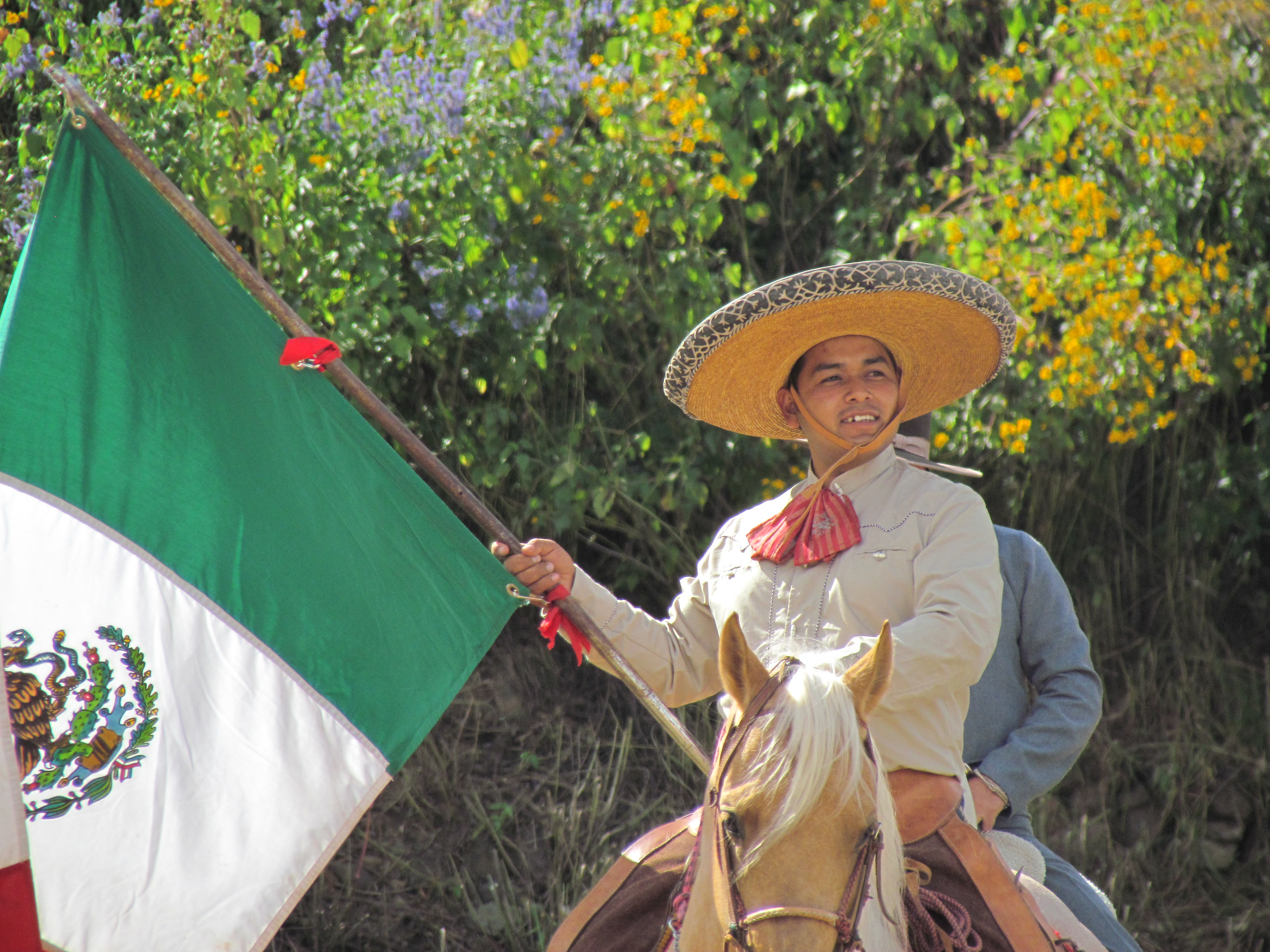 Muestra de charreria en la feria del mole 2014 This photo has been taken in the country: Mexico